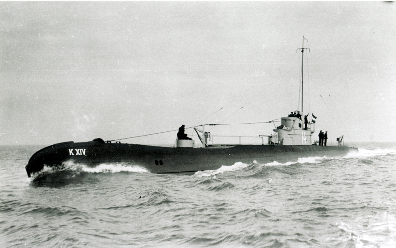 De onderzeeboot Hr.Ms. K XIV deed tijdens WO II voornamelijk dienst in het Verre Oosten.